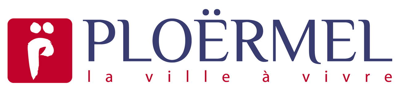 Logo de la ville de Ploërmel de 2009 à 2014.